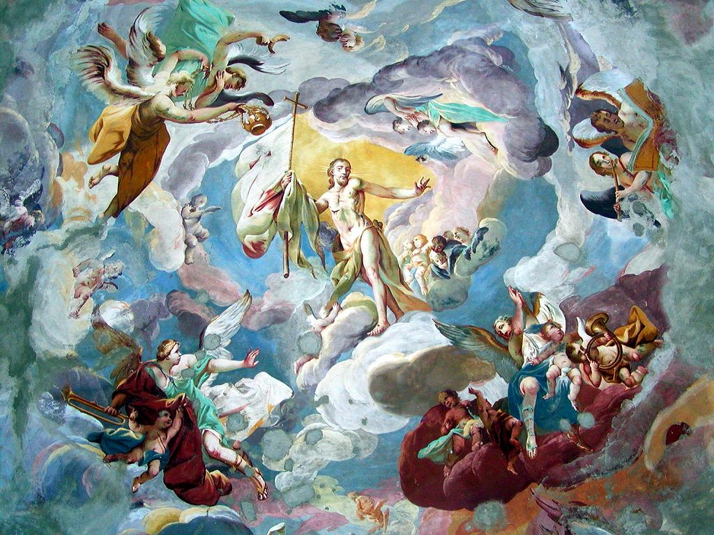 Kalvária, stropná maľba, Banská Štiavnica.